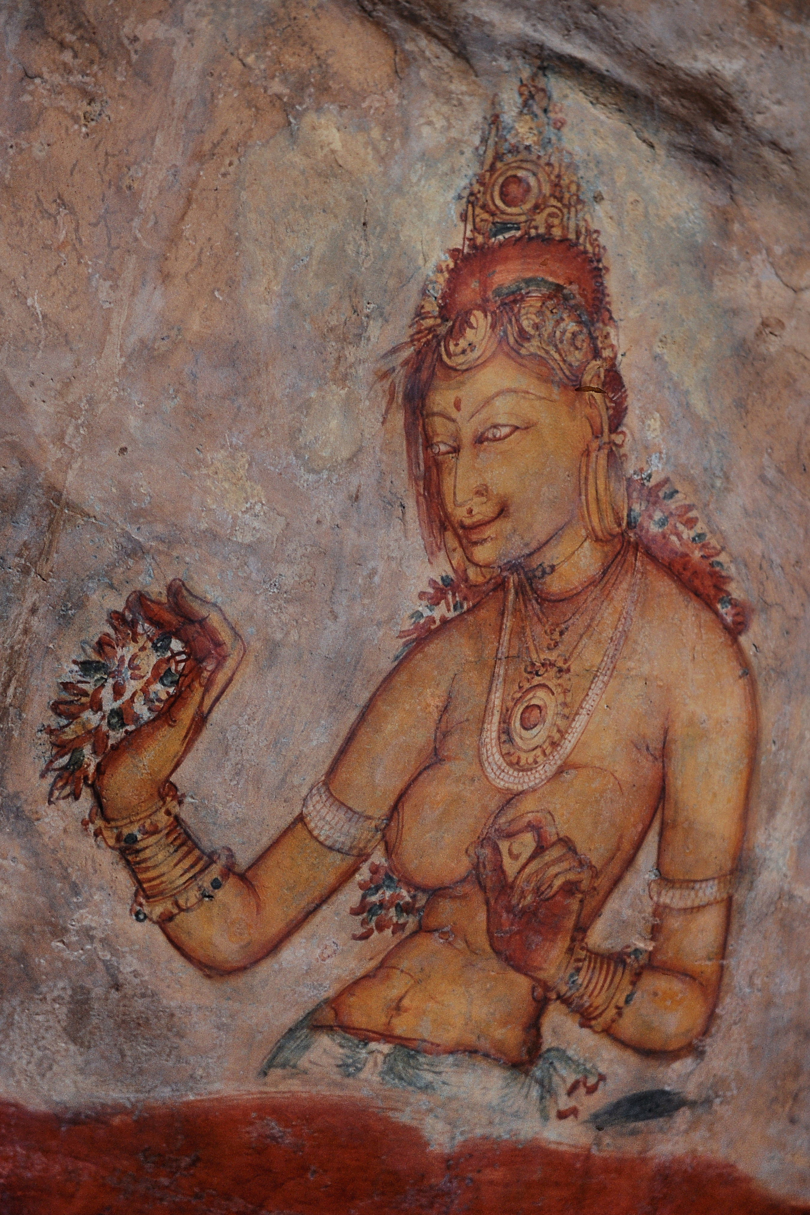 Wolkenmädchen in Sigiriya, Sri Lanka, aufgenommen 1970